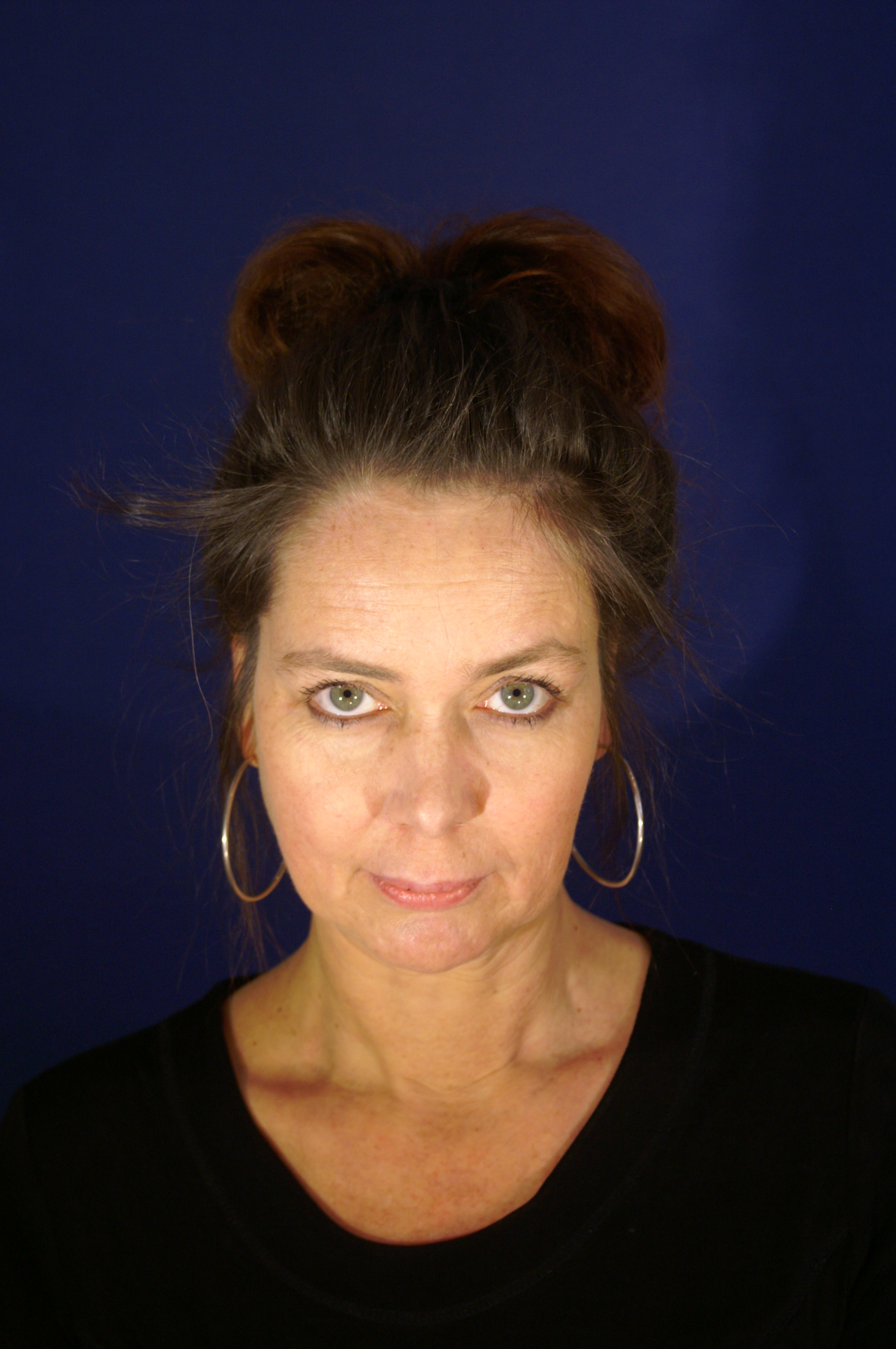 Portrait der Autorin Christine Sylvester